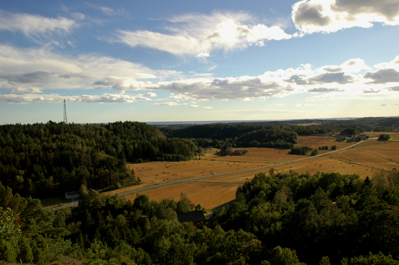 Brunlanes sett fra Løkås ved Austein.